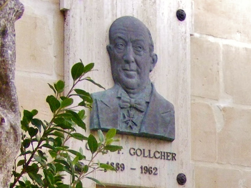 Tablica ku czci Olofa F. Gollchera w Palazzo Falson w Mdinie, Malta